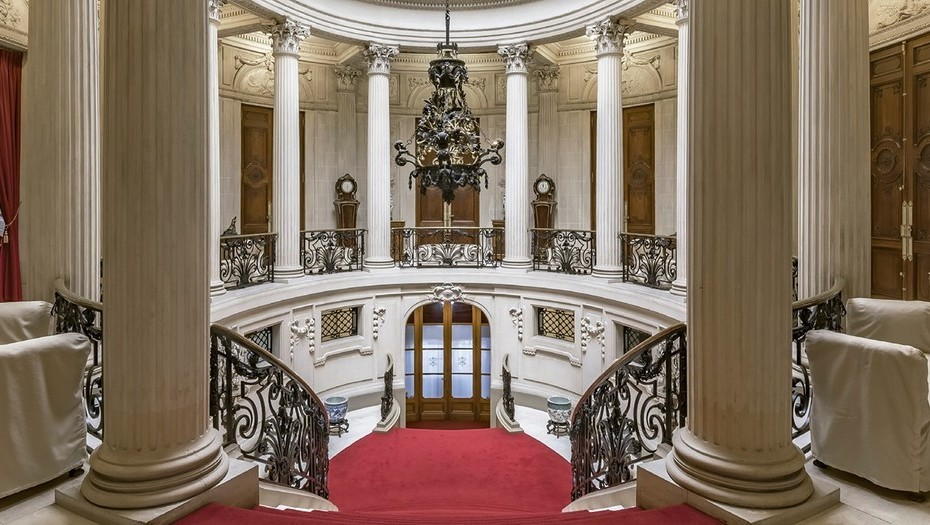 Vista del interior.